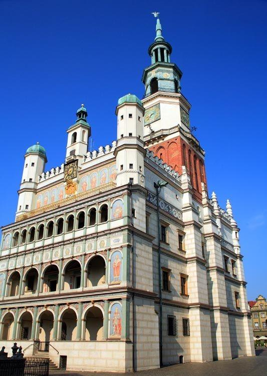 Polska by Ewa and Maek Wojciechowsy